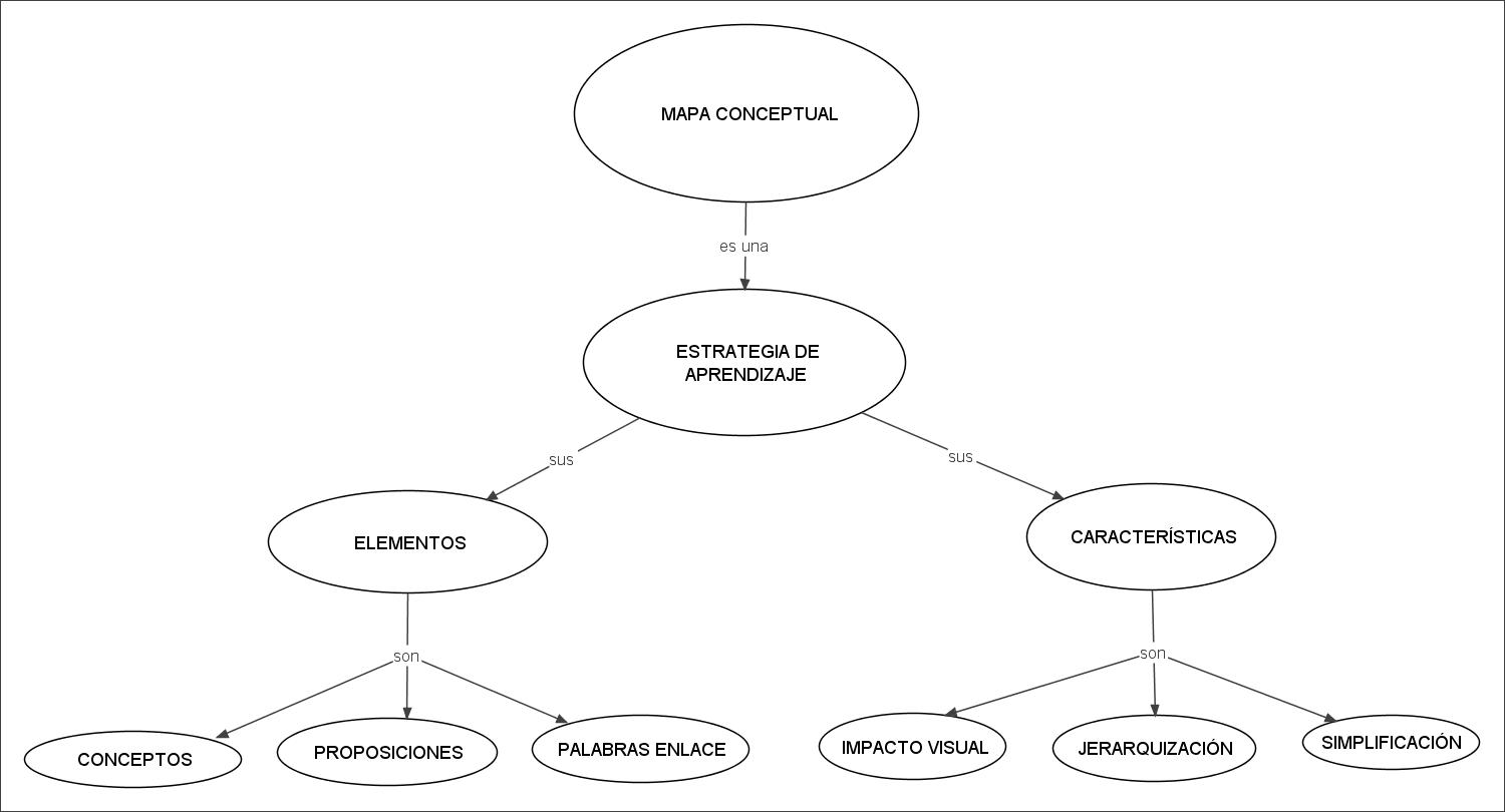 conocimientos previos